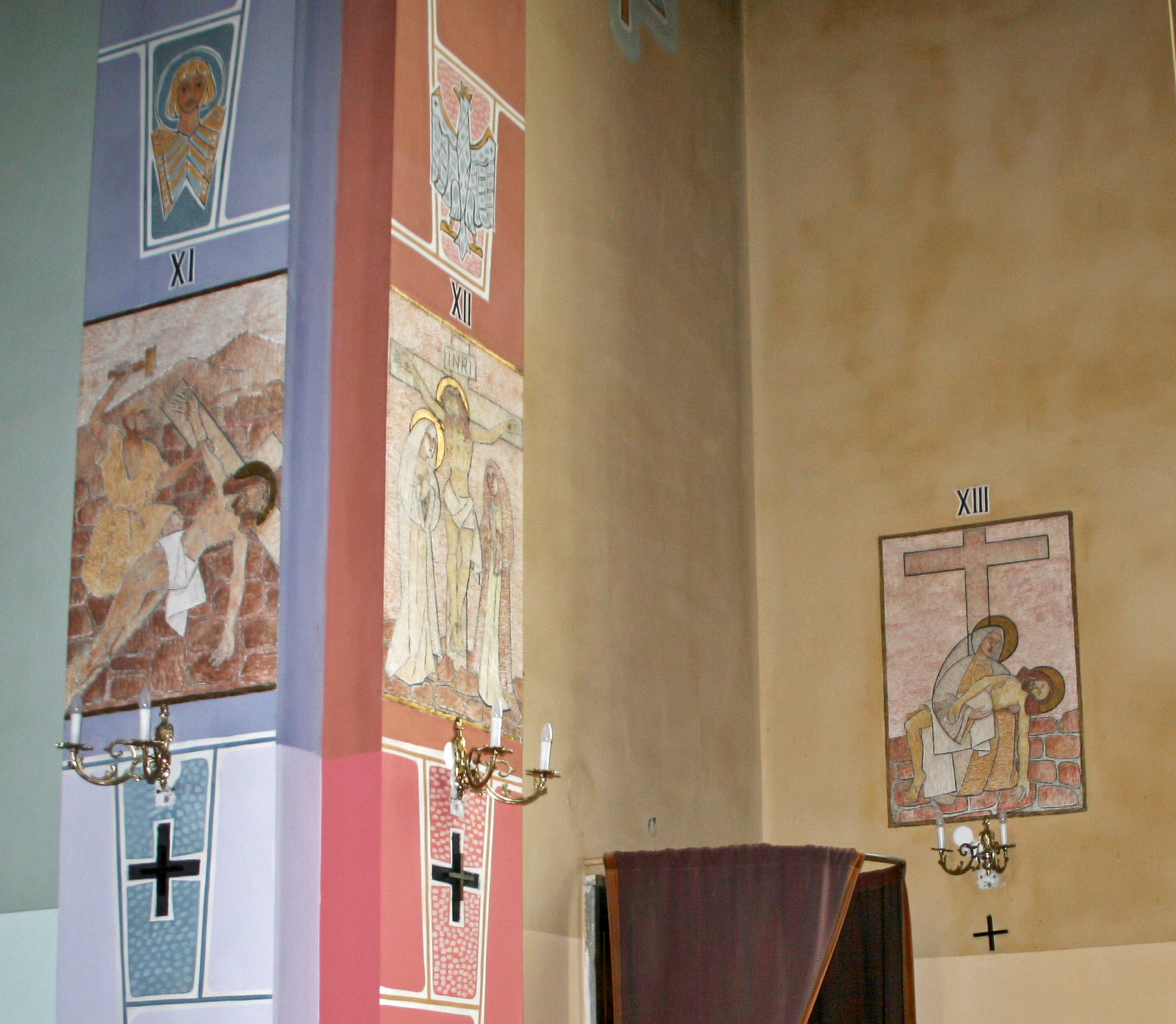 Stacje Drogi Krzyżowej w kościele pw. św. Zygmunta w Pniowie. Projektował i wykonał prof. Jana Budziło